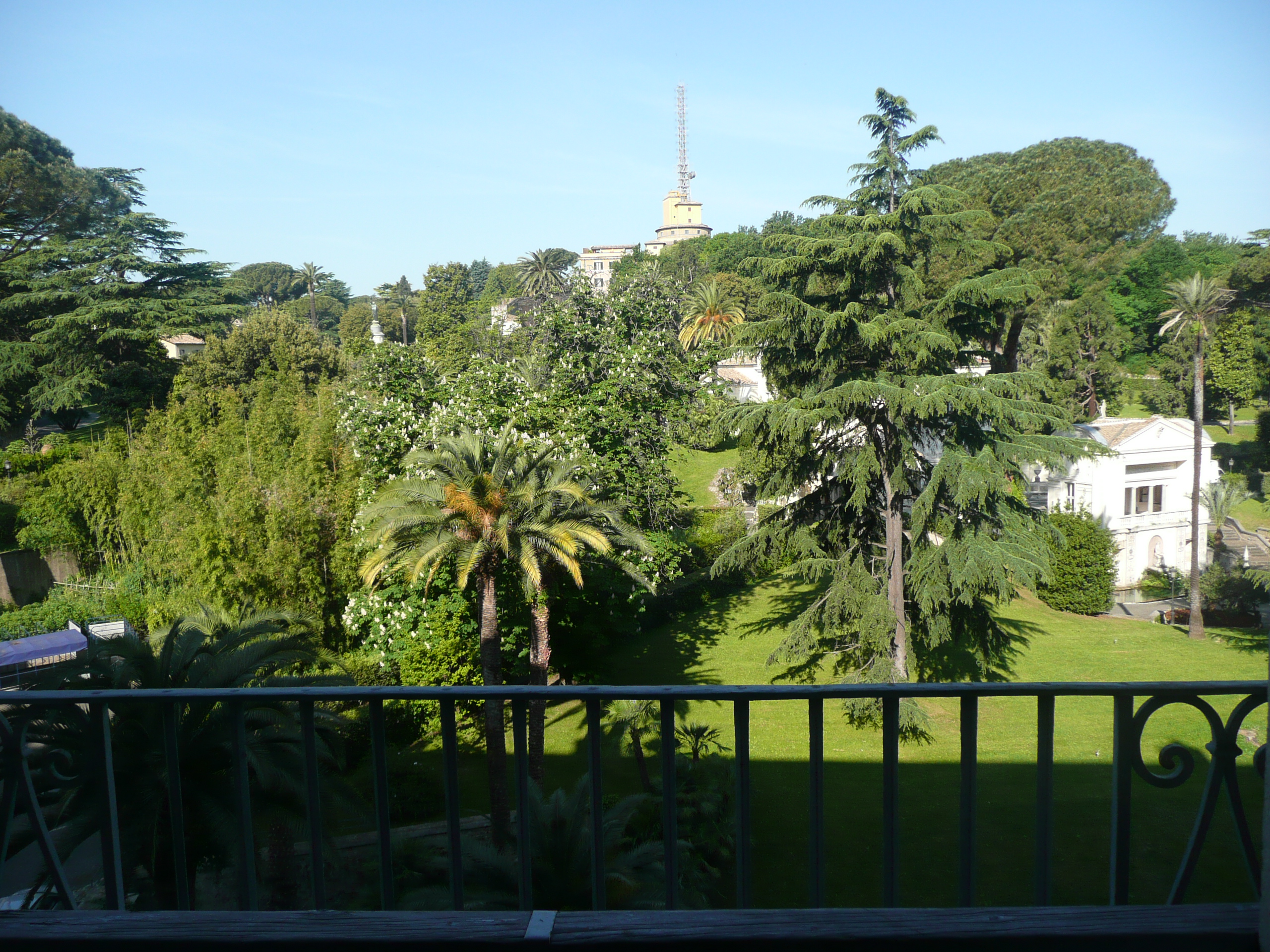 Ватиканські сади. Вигляд з вікна Галереї географічних карт